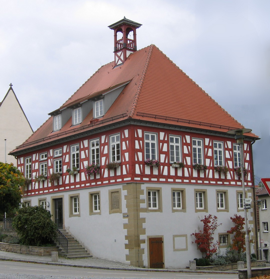 Kirchberg an der Murr, Rathaus von 1787